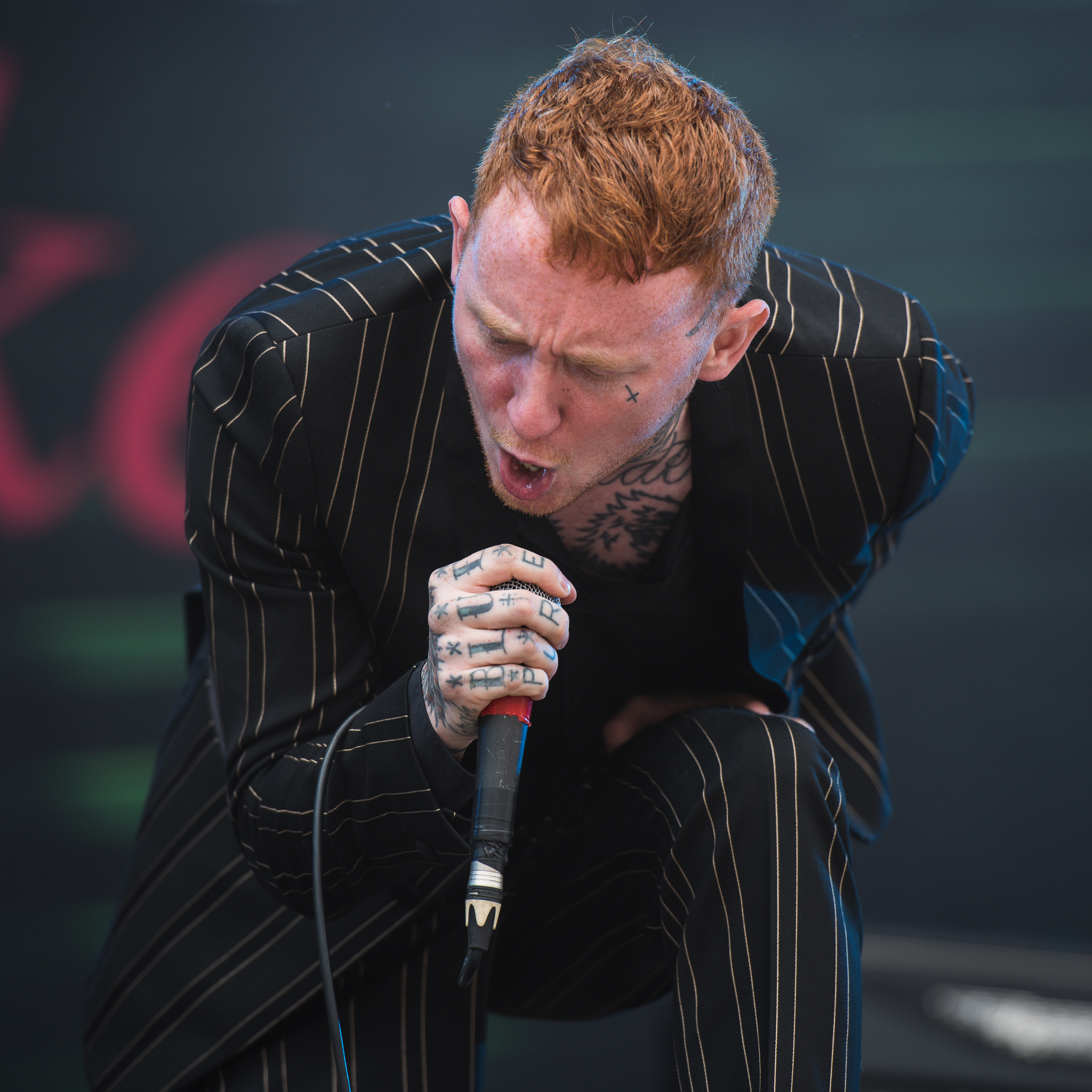 ARGO-Konzerte,Beck's Park Stage,Frank Carter,Frank Carter & The Rattlesnakes,Konzert,Livekonzert,Livemusik,Musik,RiP,Rock im Park 2017